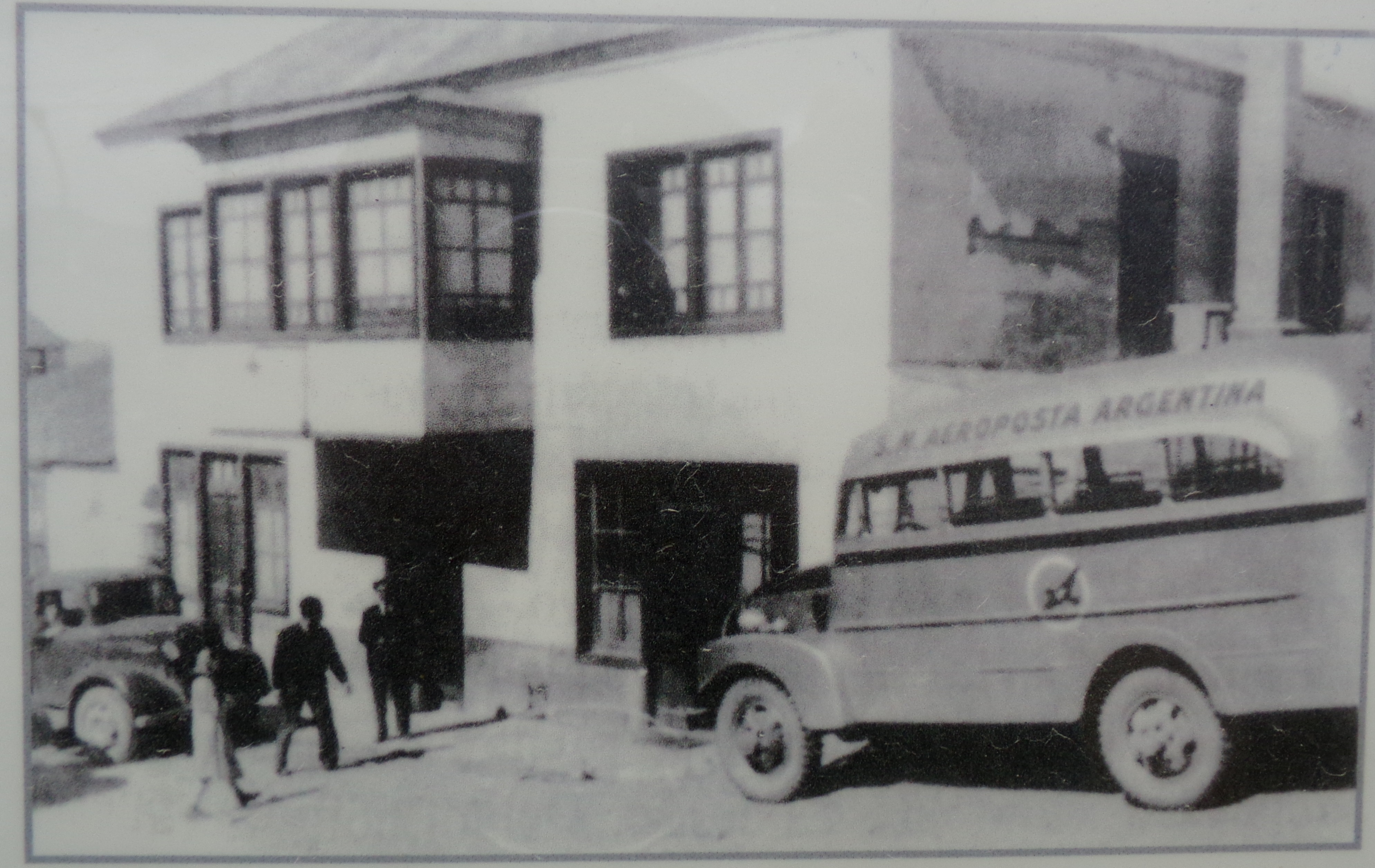 Oficinas y colectivo de Aeroposta Argentina en Ushuaia